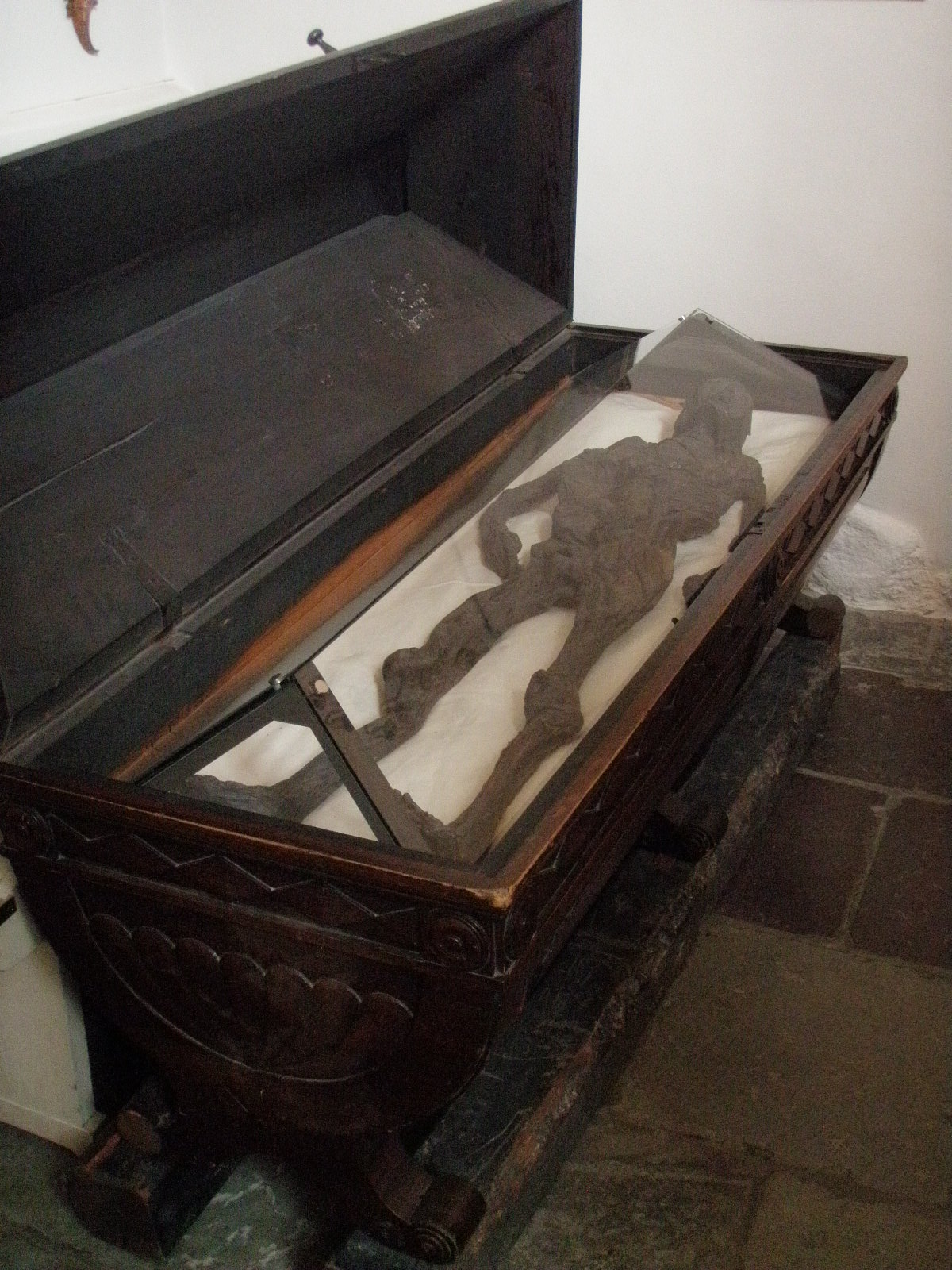 Dronning Gunhild er et almindeligt (men sagligt forkert) navn for det moselig, som blev fundet i Haraldskær Mose 10 km vest for Vejle i 1835, begravet i Sankt Nikolaj Kirke i Vejle i en træsarkofag.